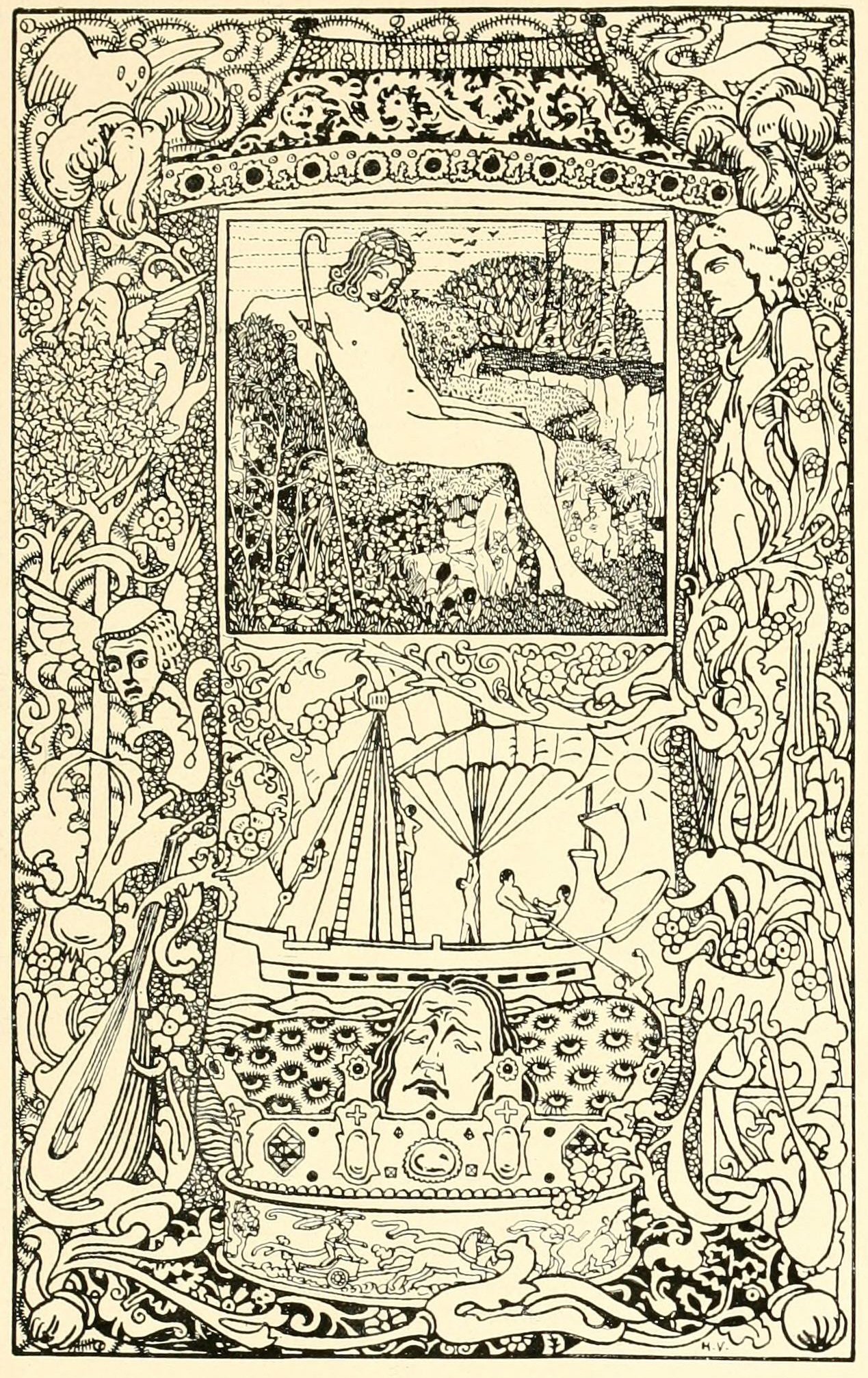 Buchschmuck zu Oscar Wildes "Granatapfelhaus"